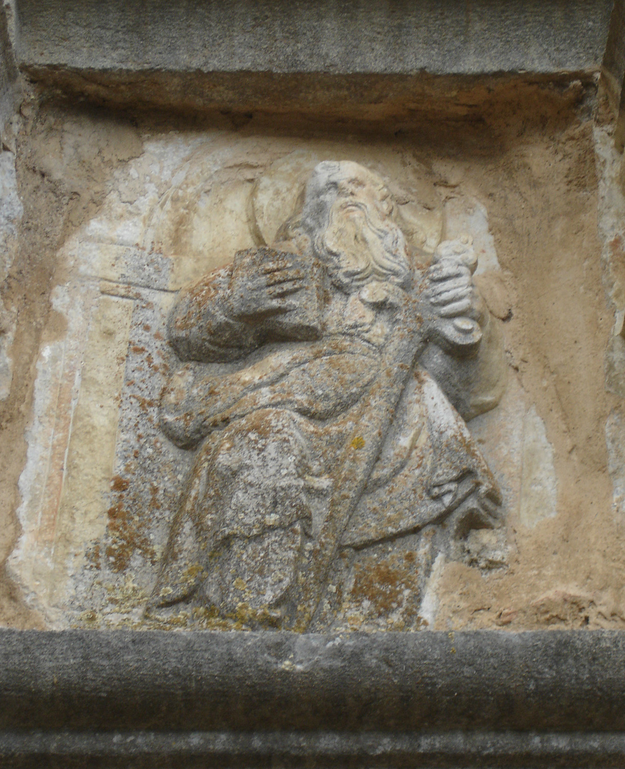 Monestir de Sant Pau de Fontclara (Girona, Catalunya, Espanya) - Detall de Sant Pau, al dintell